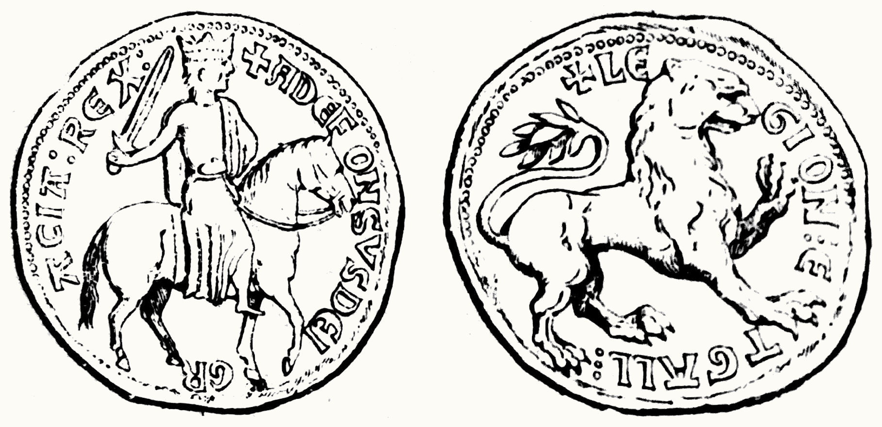 Selo de chumbo de Afonso VIII, rei de Galiza e León (1188-1230). Lenda: Adefonsvs Dei Gracia Rex / Legion et Gall.